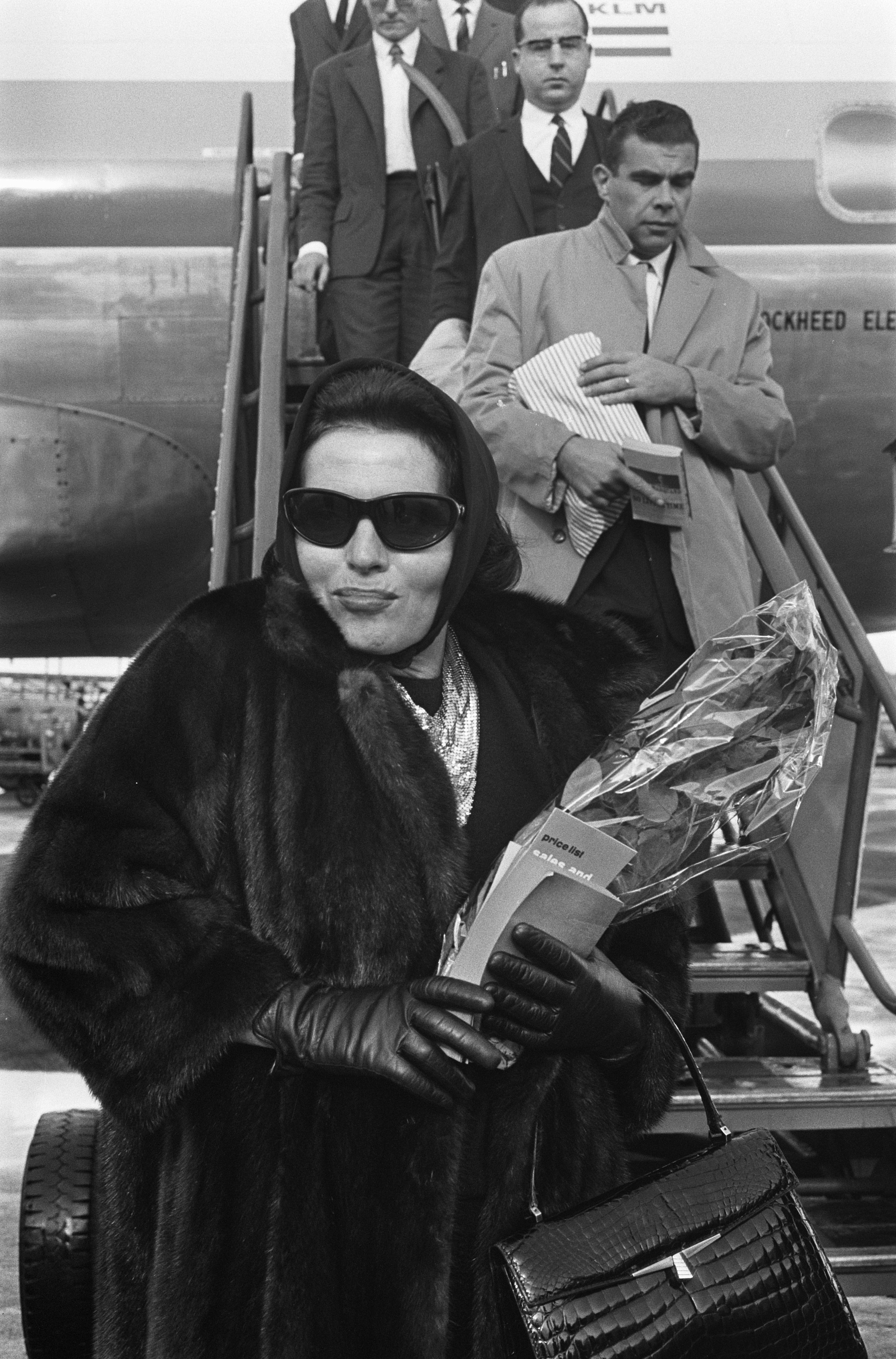 Collectie / Archief : Fotocollectie Anefo Reportage / Serie : [ onbekend ] Beschrijving : Amalia Rodrigues [Portugese fado-zangeres] op Schiphol Datum : 8 oktober 1964 Locatie : Noord-Holland, Schiphol Trefwoorden : portretten, zangeressen Persoonsnaam : Rodrigues, Amalia Fotograaf : Pot, Harry / Anefo Auteursrechthebbende : Nationaal Archief Materiaalsoort : Negatief (zwart/wit) Nummer archiefinventaris : bekijk toegang 2.24.01.05 Bestanddeelnummer : 916-9845